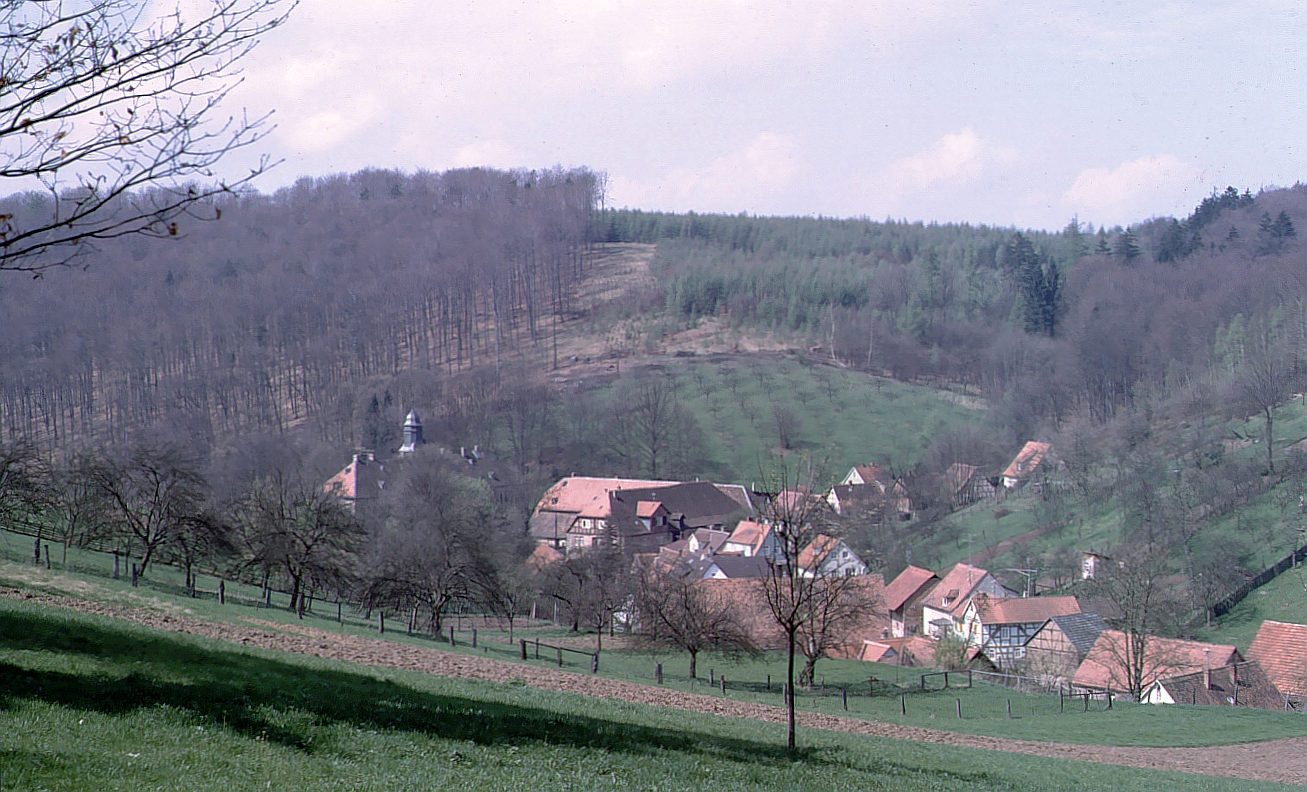 Gettenbach: Jagdschloss in Gettenbach mit altem Ortskern im Oberdorf von Süden aus